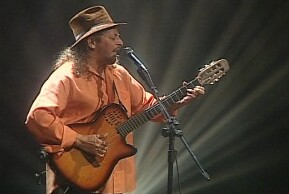 Músico brasileiro Geraldo Azevedo em imagem do acervo da TV Brasil.